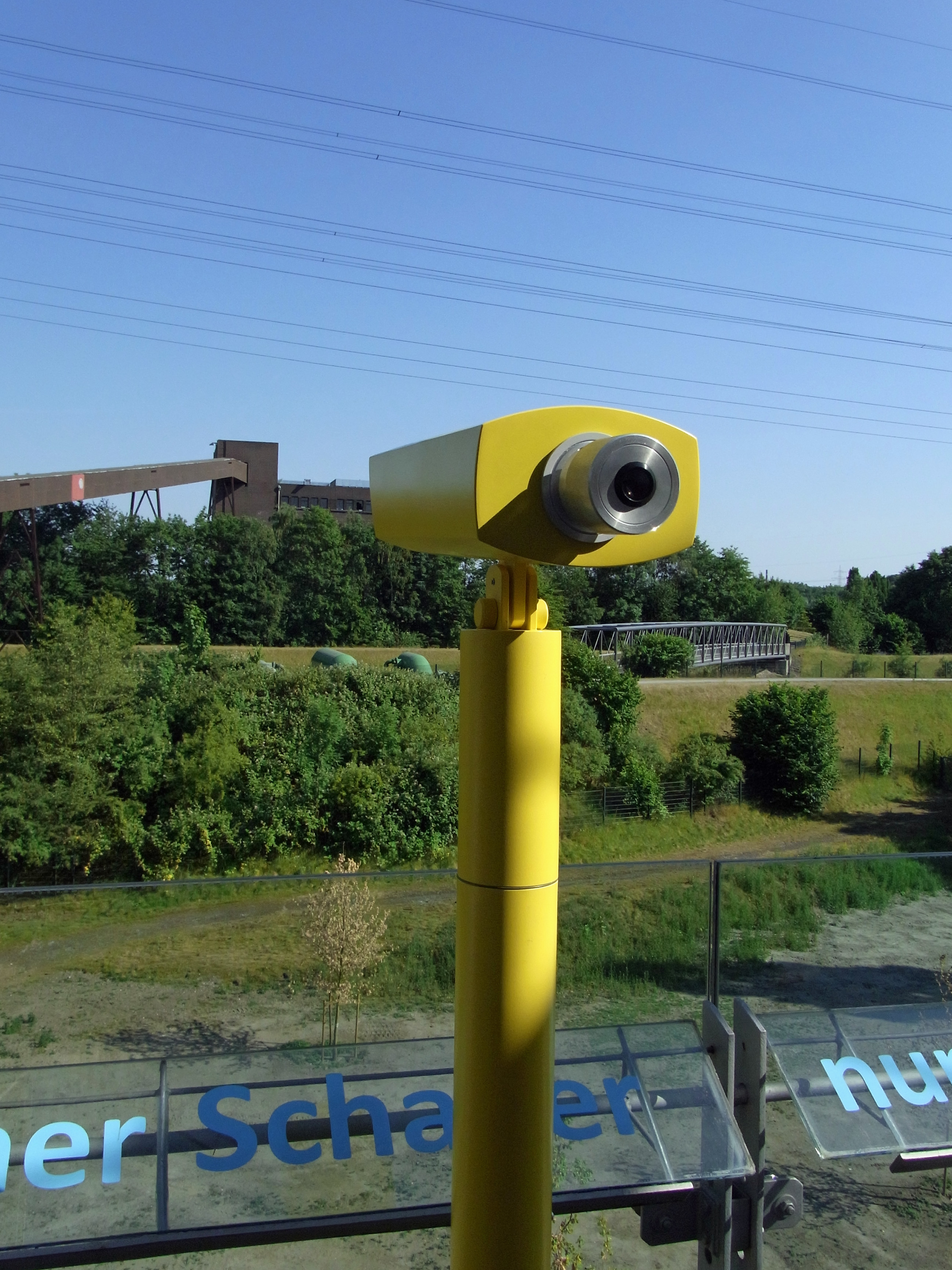 Emscherkunst.2010 Jeppe Hein: Connecting Views Eines der neun Fernrohre am Besucherzentrum im Nordsternpark